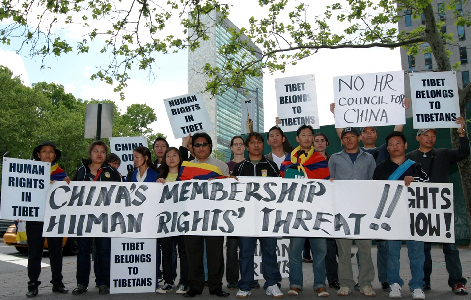 聲援自由圖博